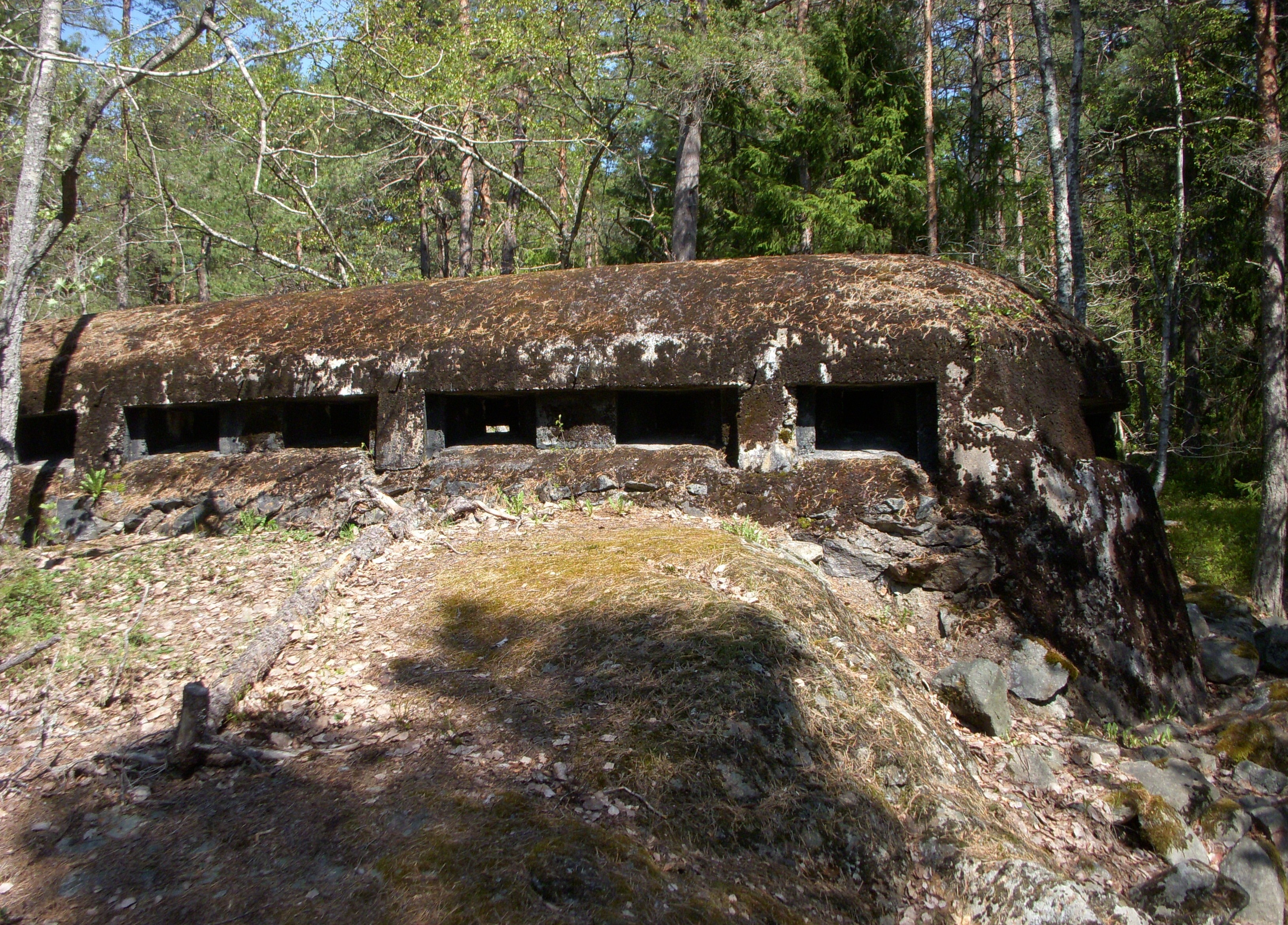 Måndalsfortet i Tyresö, södra Stockholm, maj 2011